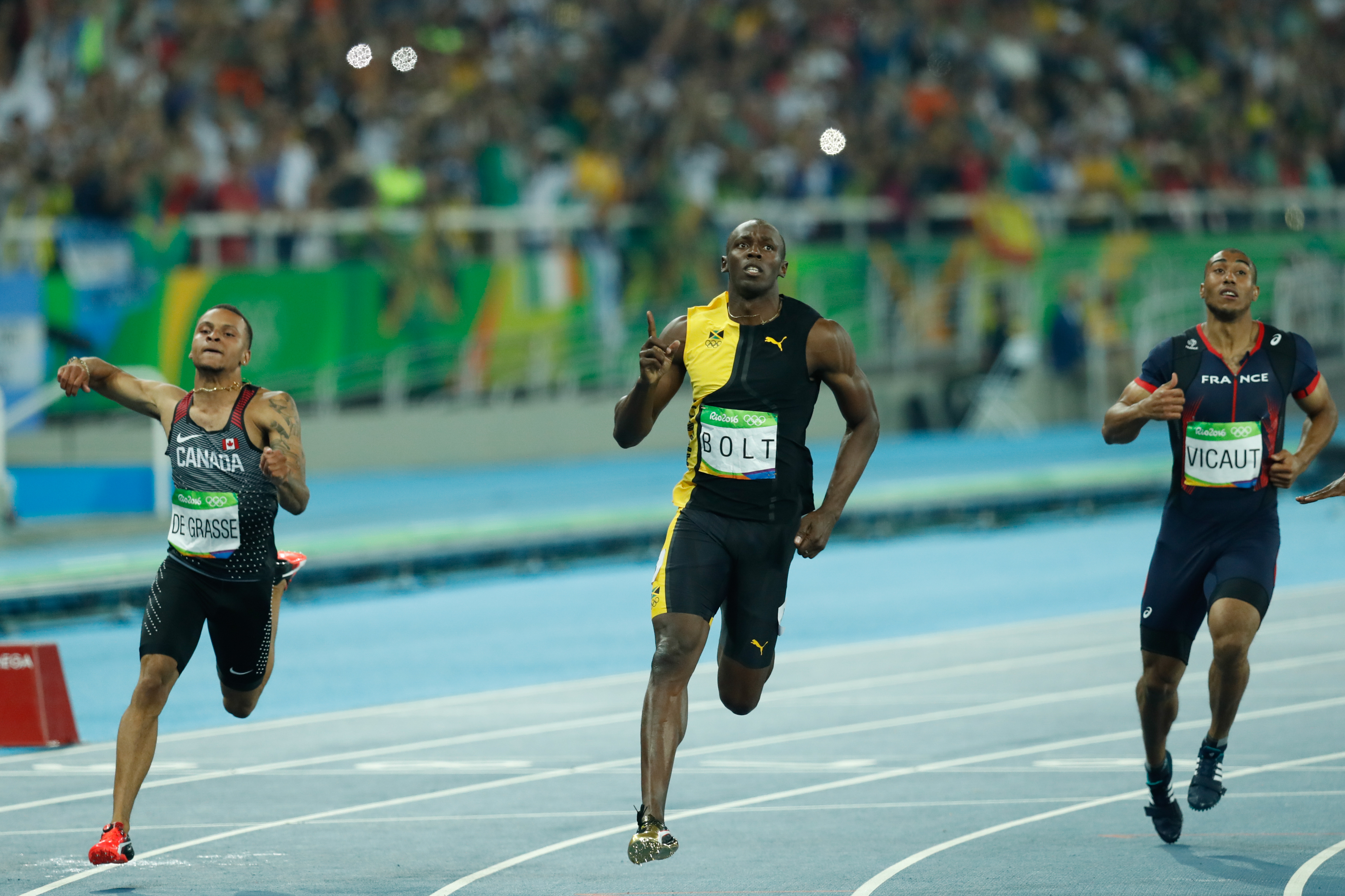 Rio de Janeiro - O jamaicano Usain Bolt, garantiu o ouro e fez história ao conquistar pela terceira vez o título de homem mais rápido do mundo nos 100 metros rasos em uma Olimpíada (Fernando Frazão/Agência Brasil).